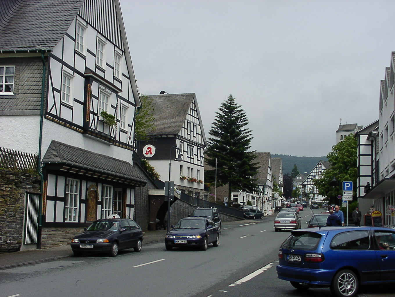 Bildbeschreibung: Hauptstraße von Bad Fredeburg Quelle: selbst fotografiert Fotograf-- Ingo2802 00:44, 17. Apr 2006 (CEST) Datum: 15.06.2002